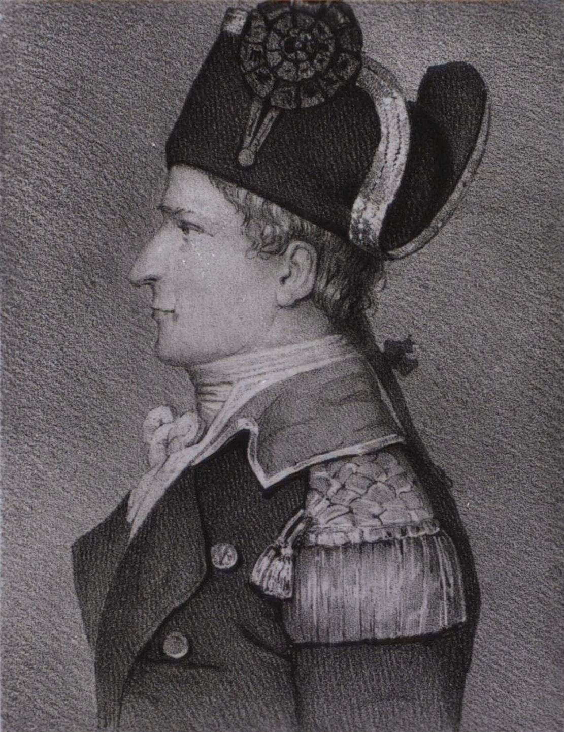 Viceadmiral Olfert Fischer. 1747-1829.